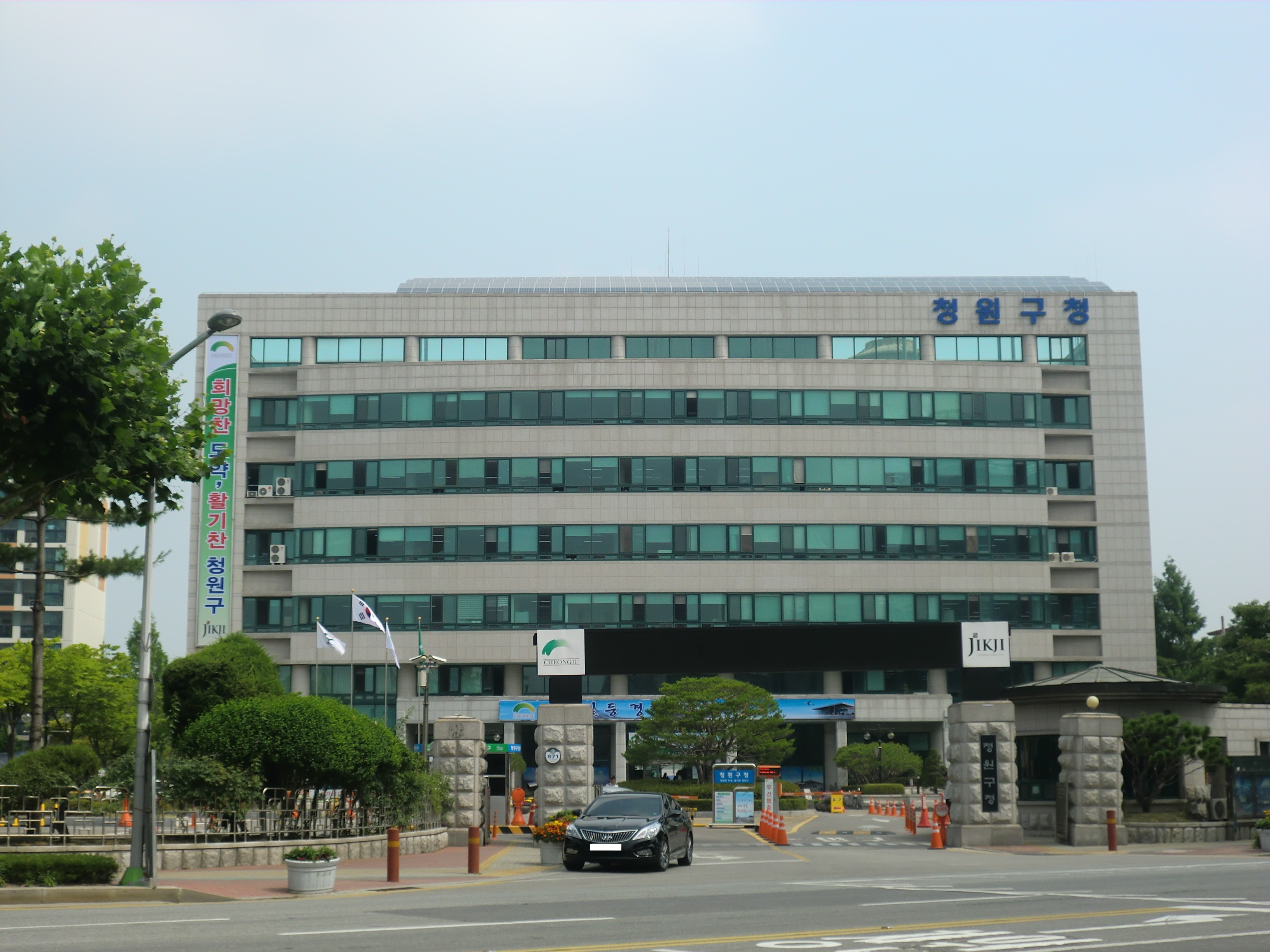 충청북도 청주시 청원구에 있는 청원구청